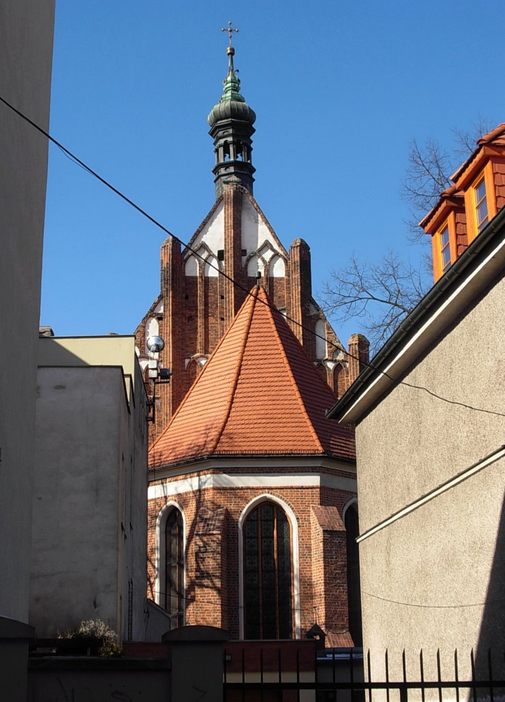 Katedra bydgoska widziana z ul. Tadeusza Skarbek-Malczewskiego